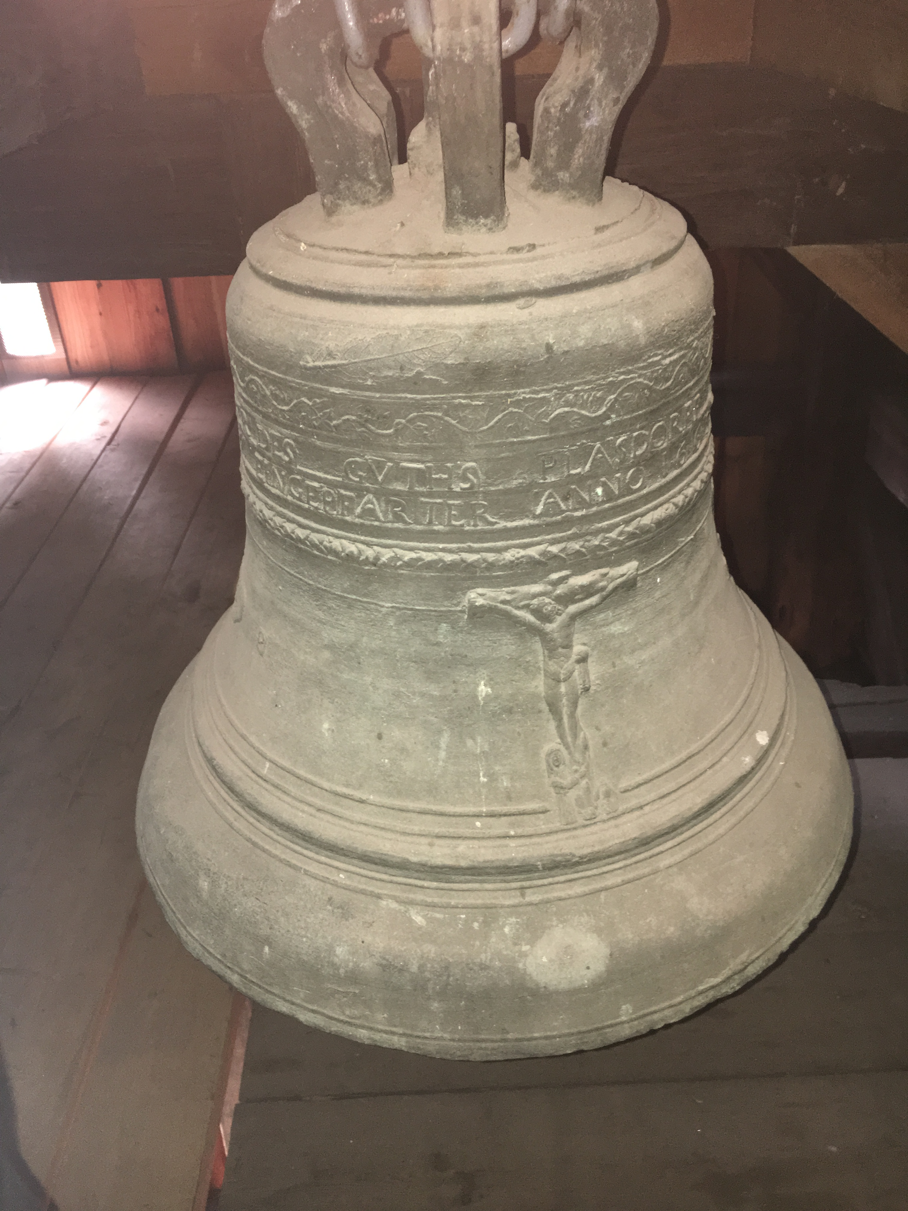 Glocke im Turm der Kirche St. Josef in Bloischdorf